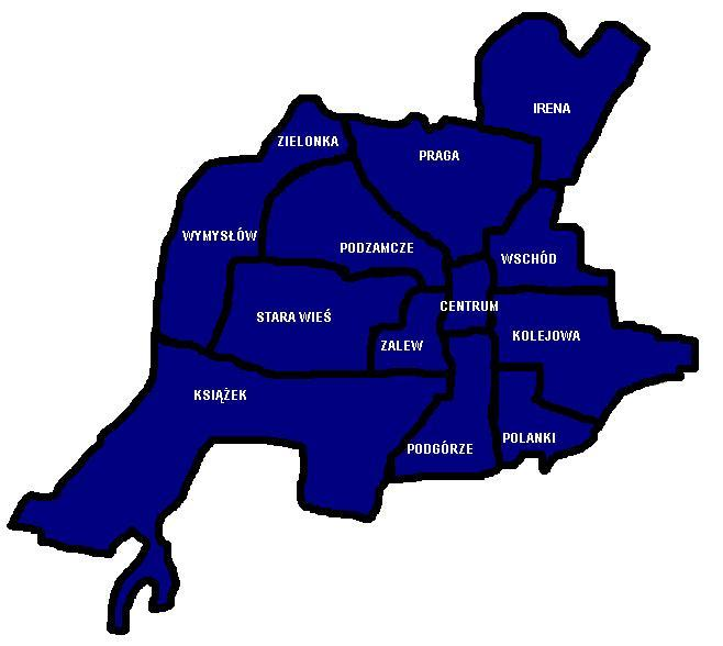 Map od Szydłowiec